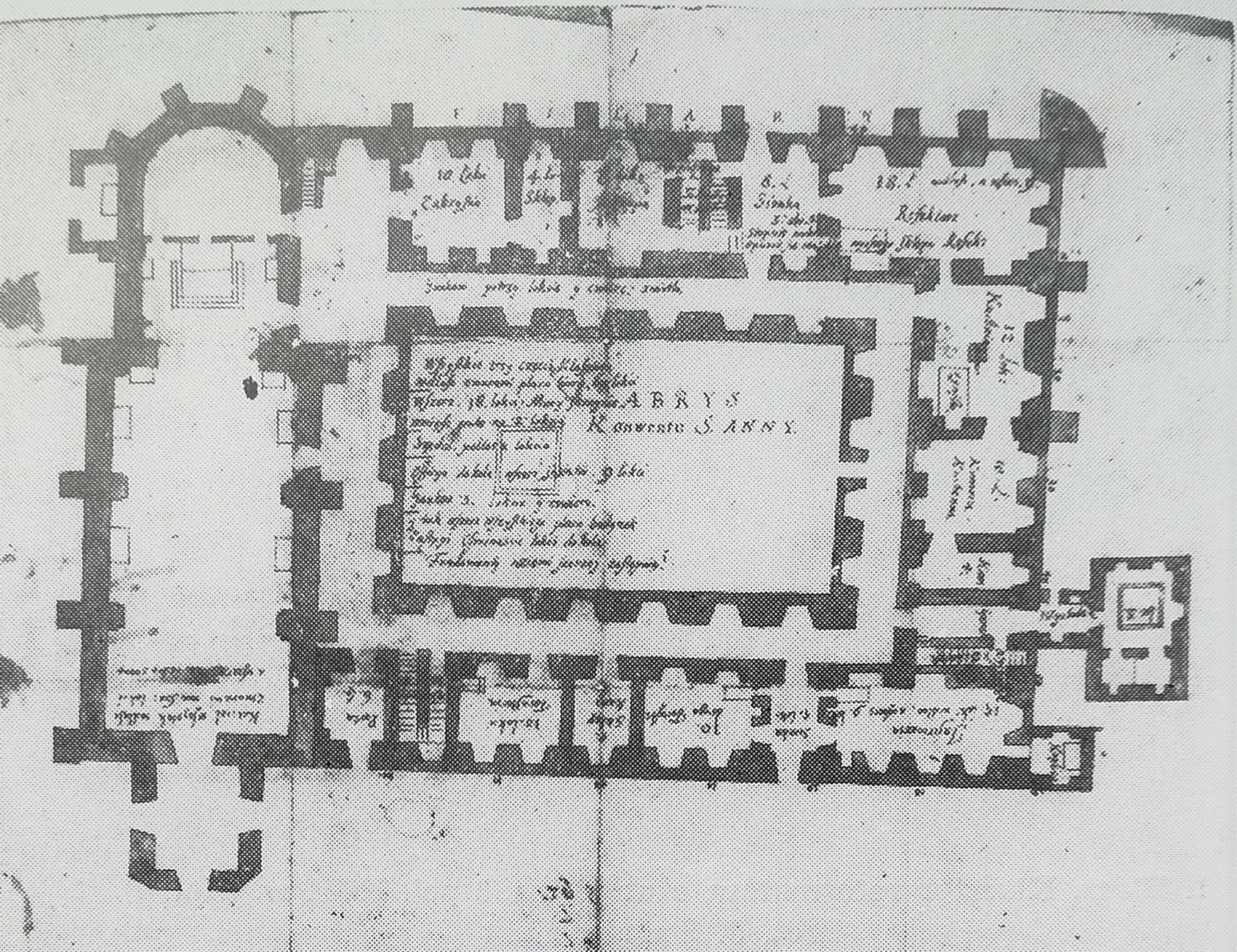 Plan klasztoru reformatów. Góra św. Anny. 1. poł XVIII w. Przyziemie.